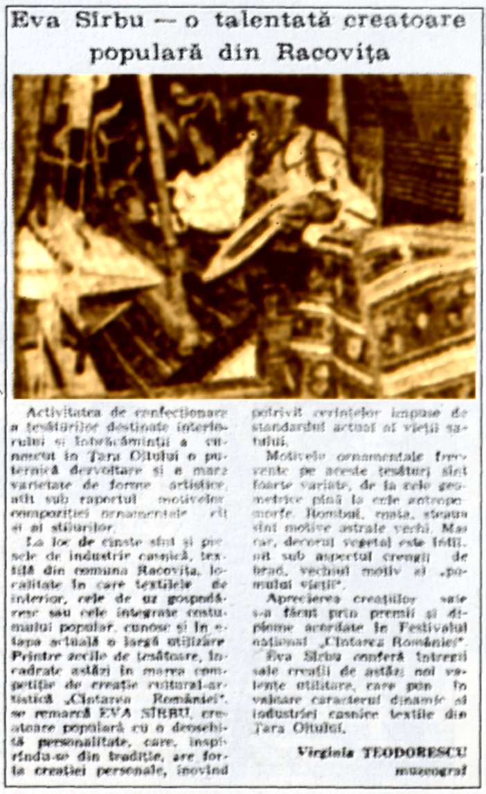 Eva Sârbu, creatoare populară din Racoviţa, Sibiu, ale cărei realizări au ajuns în faza republicană a festivalului naţional „Cântarea României”.